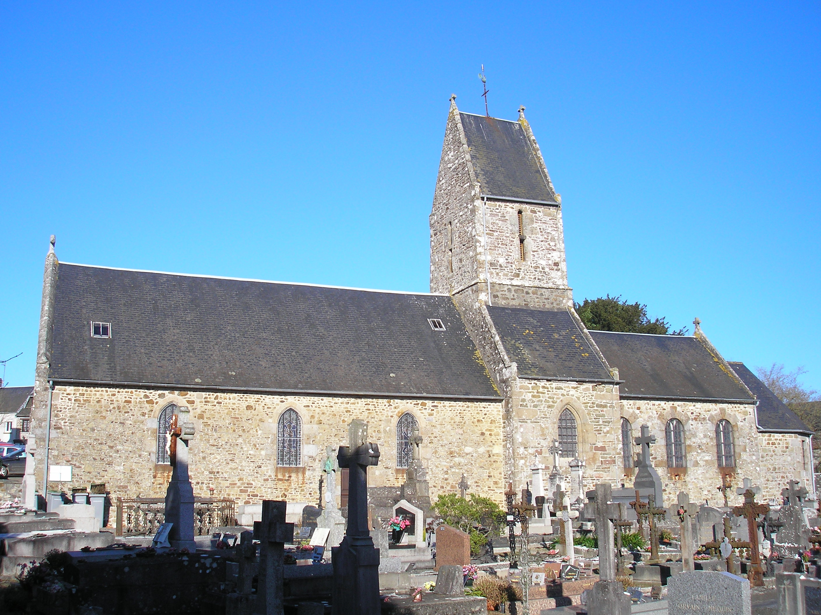 Longueville (Normandie, France). L'église Saint-Pierre.